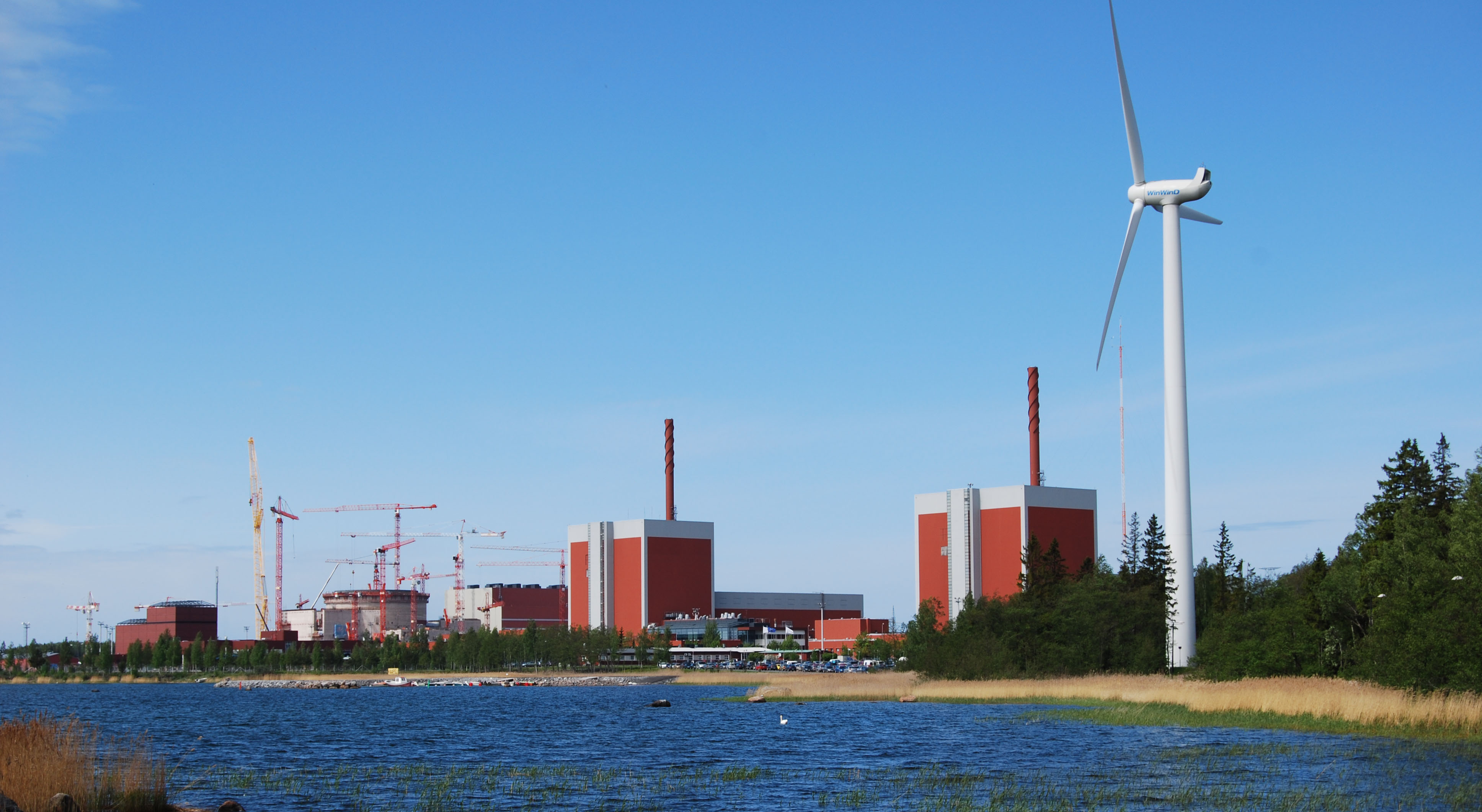 Kuva Olkiluodon ydinvoimaloista ja tuulivoimalasta.